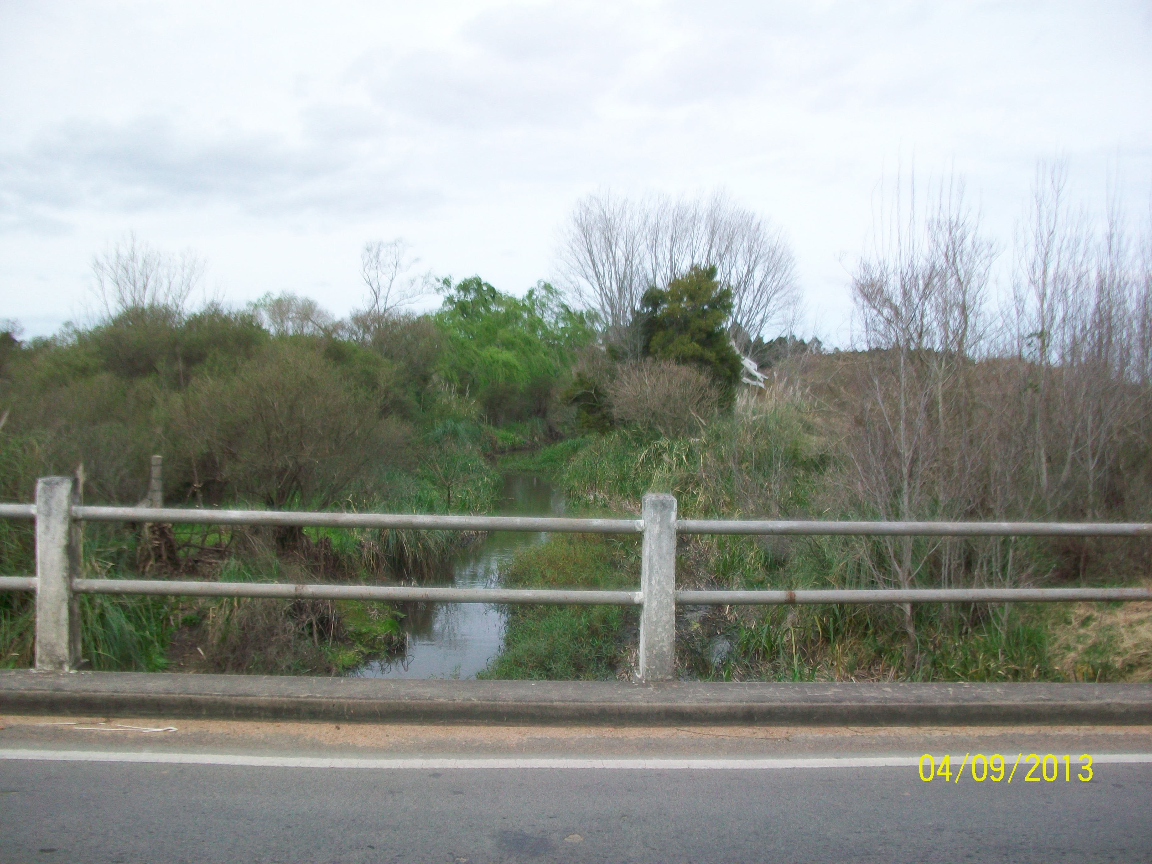 Vista Arroyo Tropa Vieja desde la ruta 87